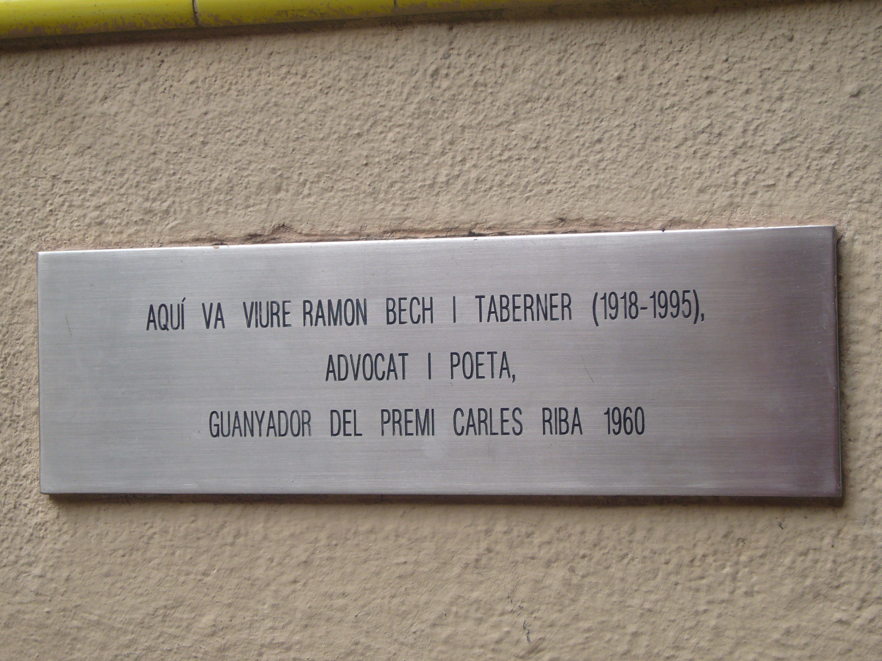 Carrer Petritxol - Placa a la casa on visqué l'escriptor Ramon Bech i Taberner (Barcelona, 16 de juny de 1918 — Barcelona, 6 de febrer de 1995)